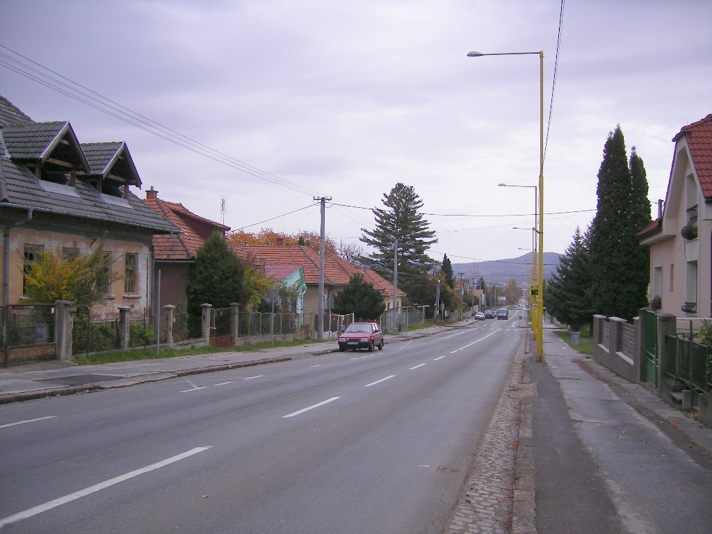 Bojnice - ulica Prievidzská